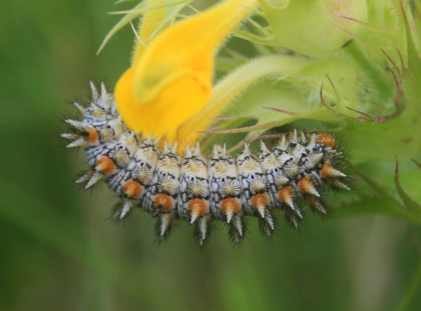 Roter Scheckenfalter (Melitaea didyma), Edelfalter (Nymphalidae), Raupe - Slowenien/Slovenija/Slovenia: Primorska, "Prärie" NNW Praproče